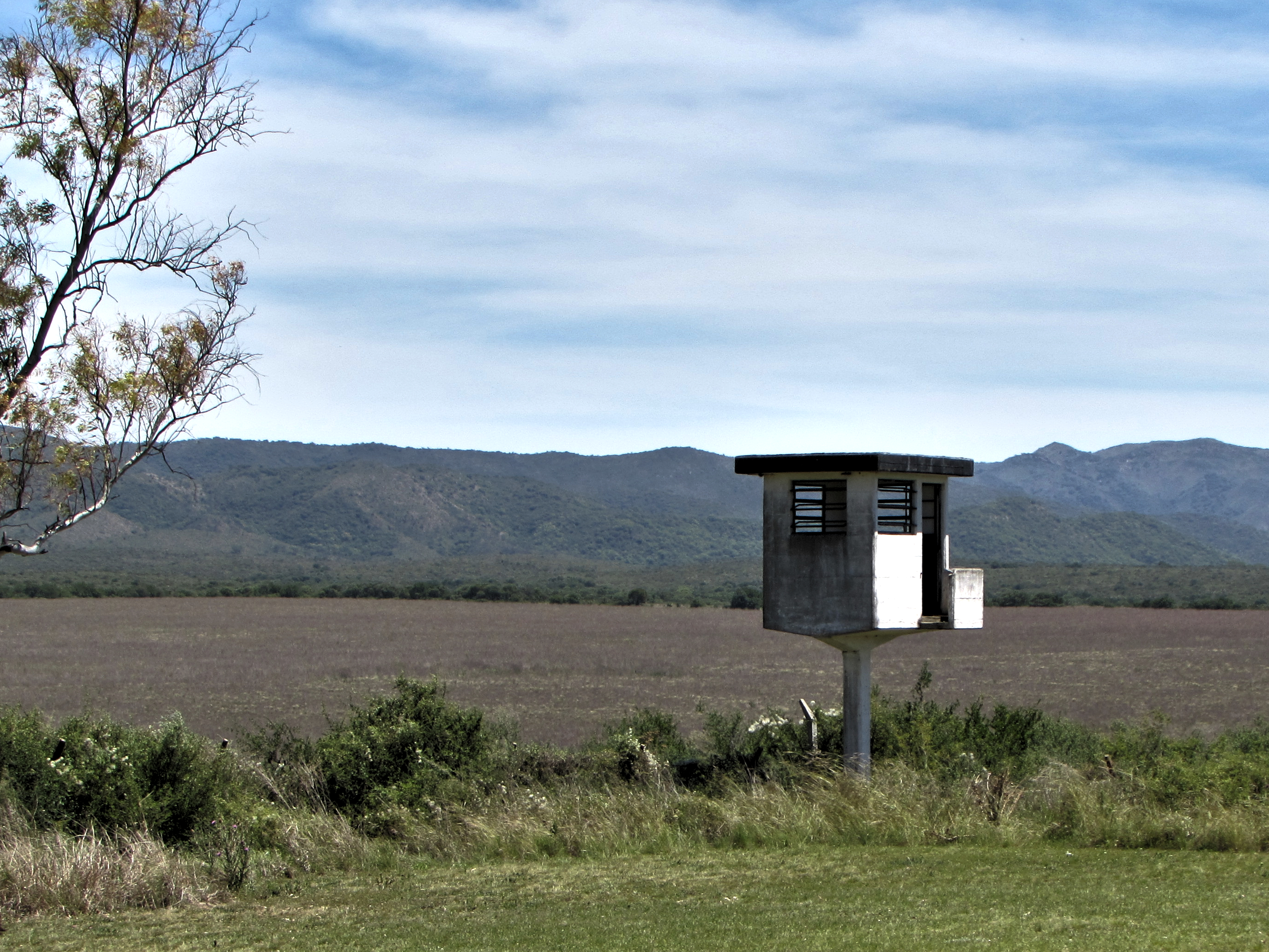 Garita de vigilancia - Espacio Para La Memoria La Perla